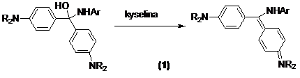 Iónochromizmus leukotriaarylmetánov